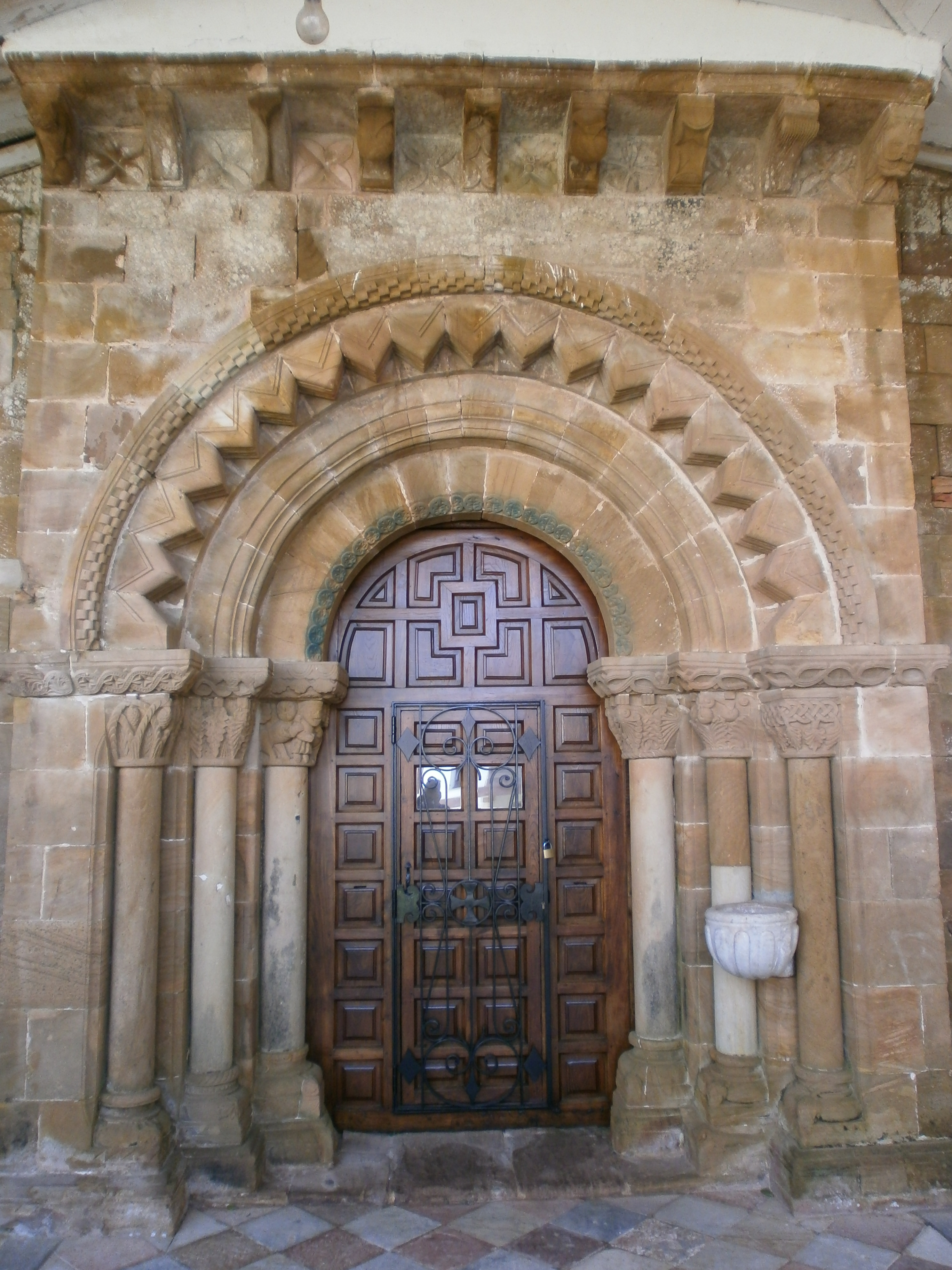 Lugás-Puerta principal al oeste con guardapolvos superior formado por nueve canecillos separados por tacos lisos